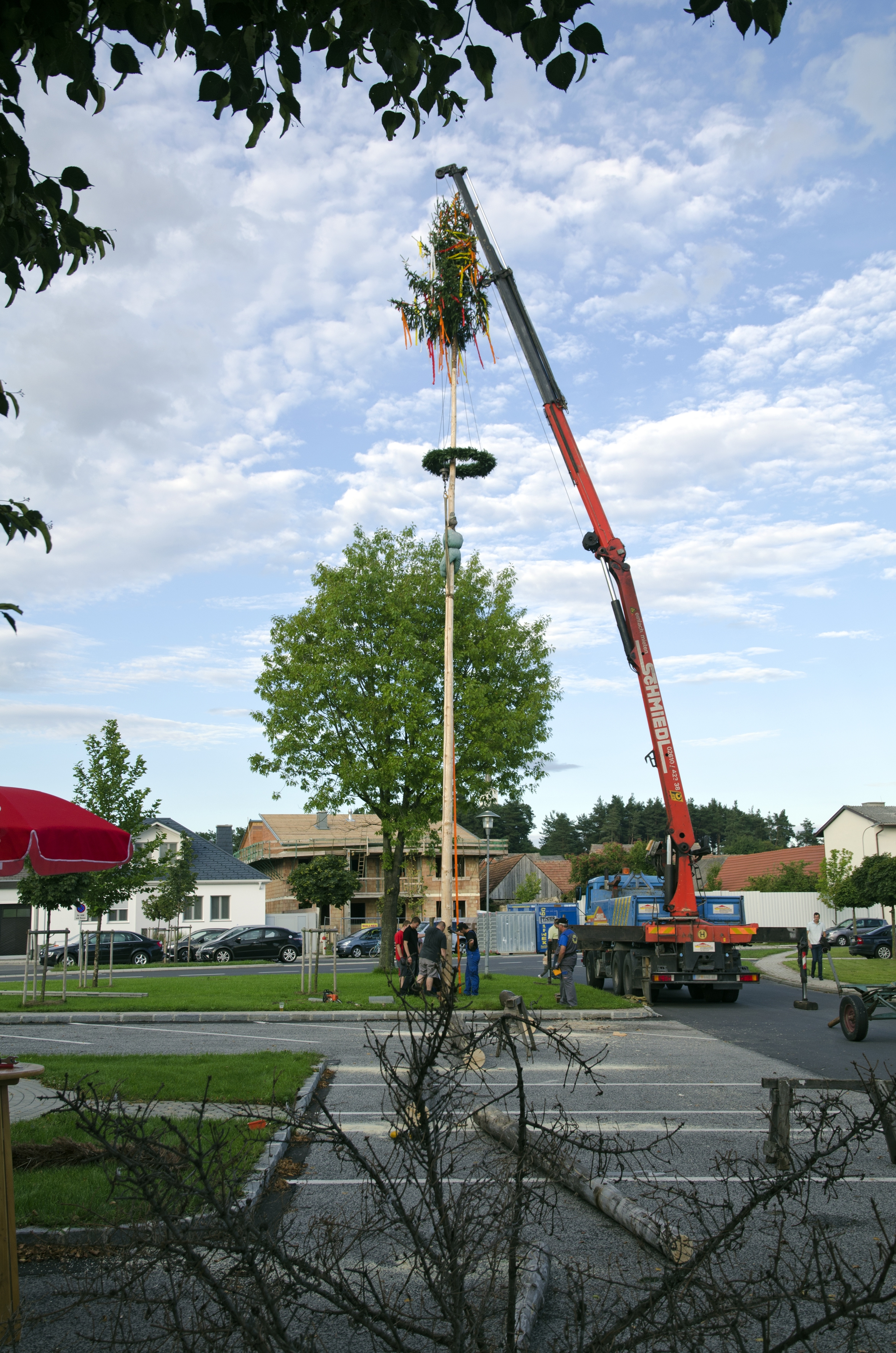 Lackendorf, Burgenland, Burschbaumstellen